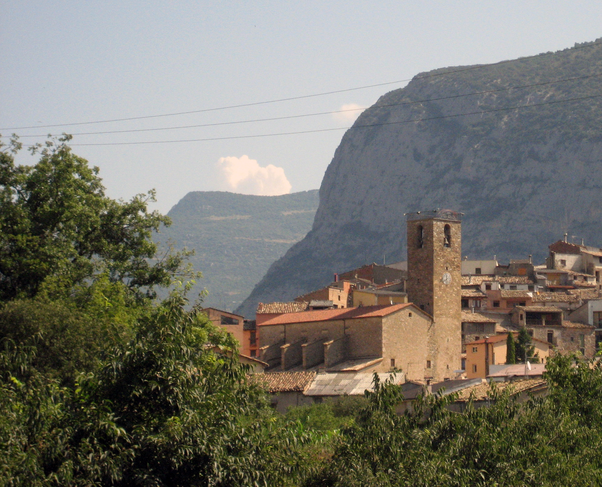 Población de Coll de Nargó, perteneciente a la comarca del Alto Urgel en Cataluña, España